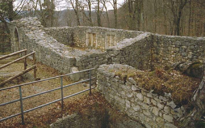 Wohnbereich der Burg Alt-Schauenburg, Frenkendorf